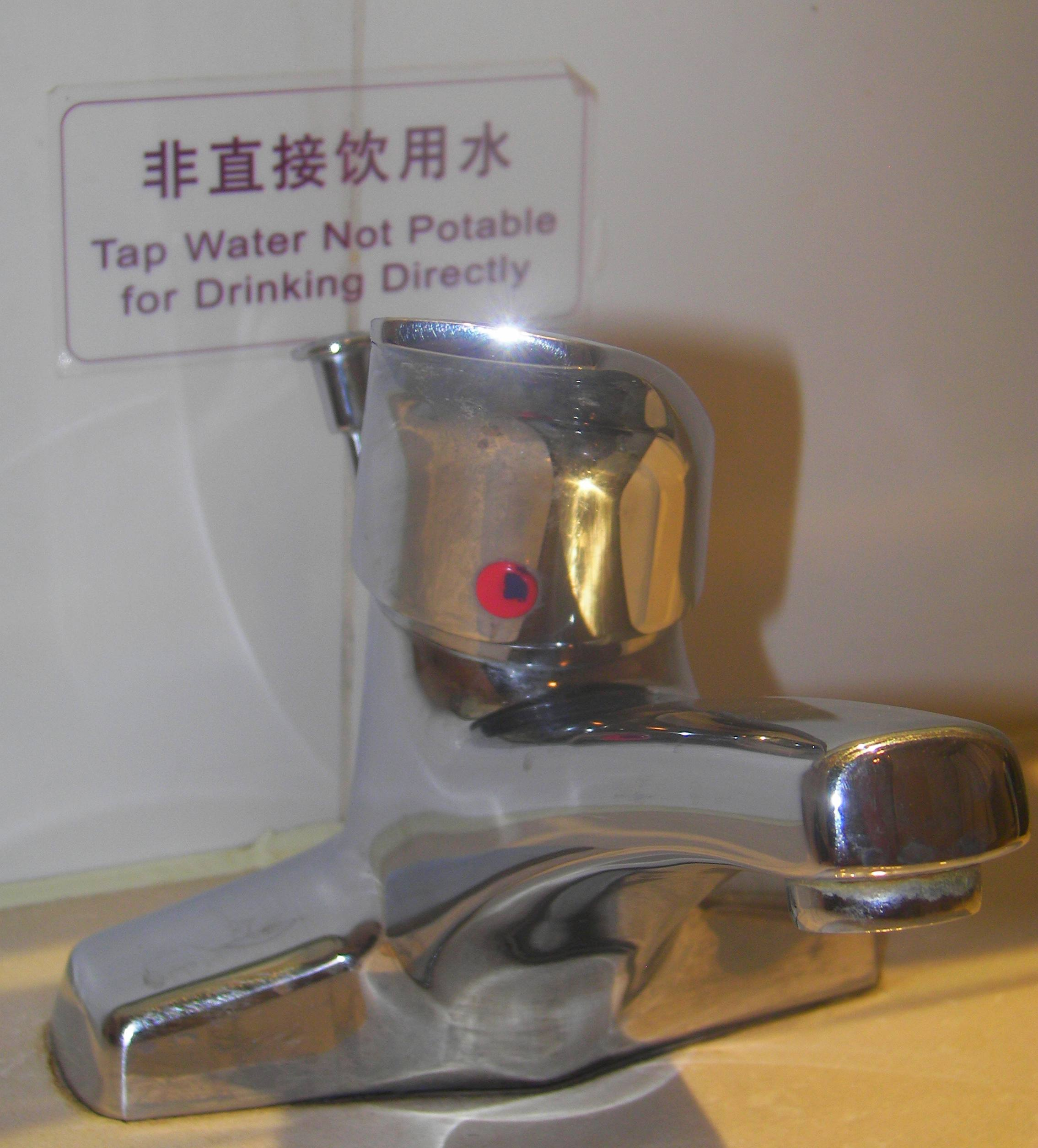 Wasserhahn mit Warnhinweis in einem Pekinger Hotel